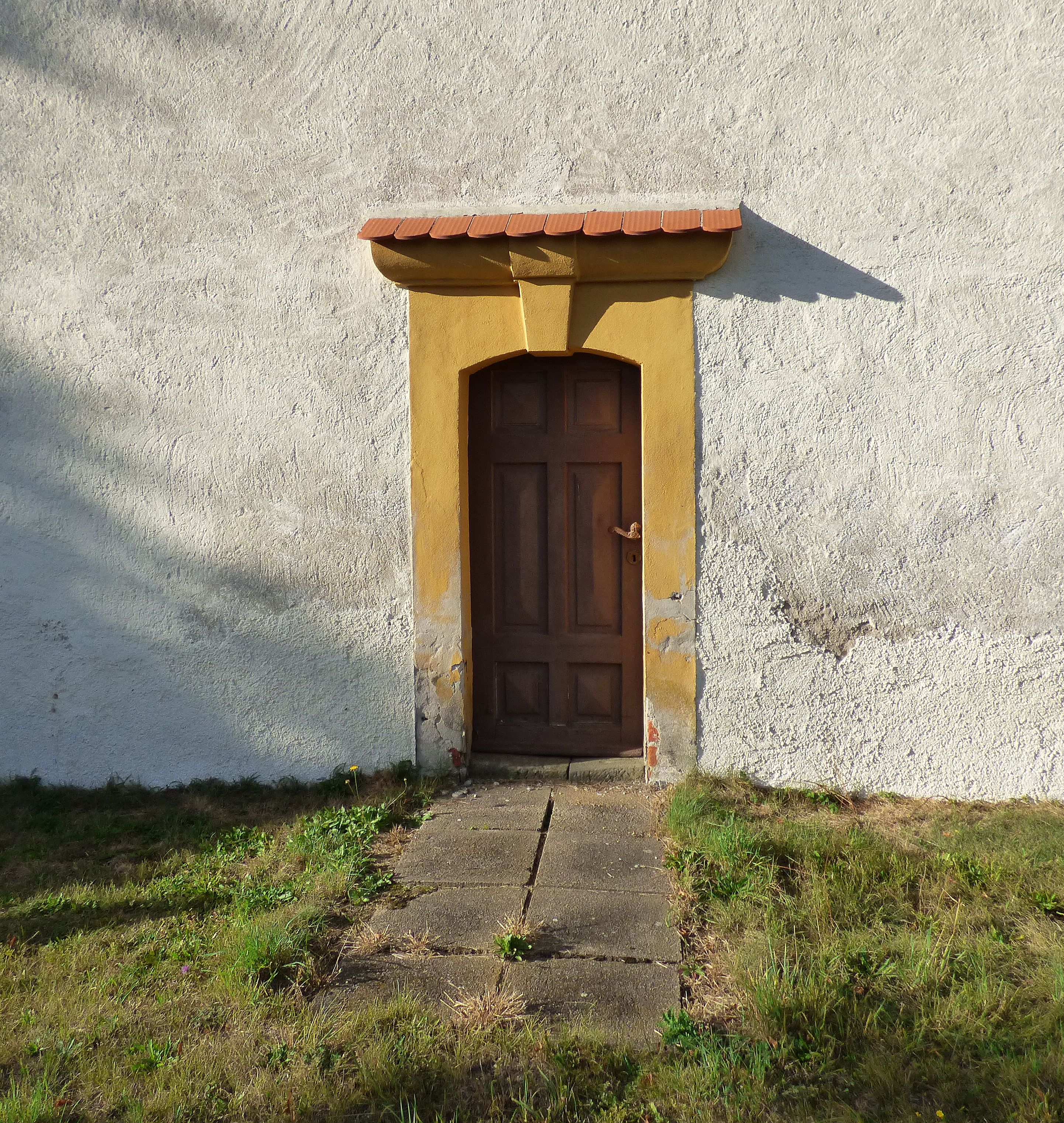 Dorfkirche Dreska